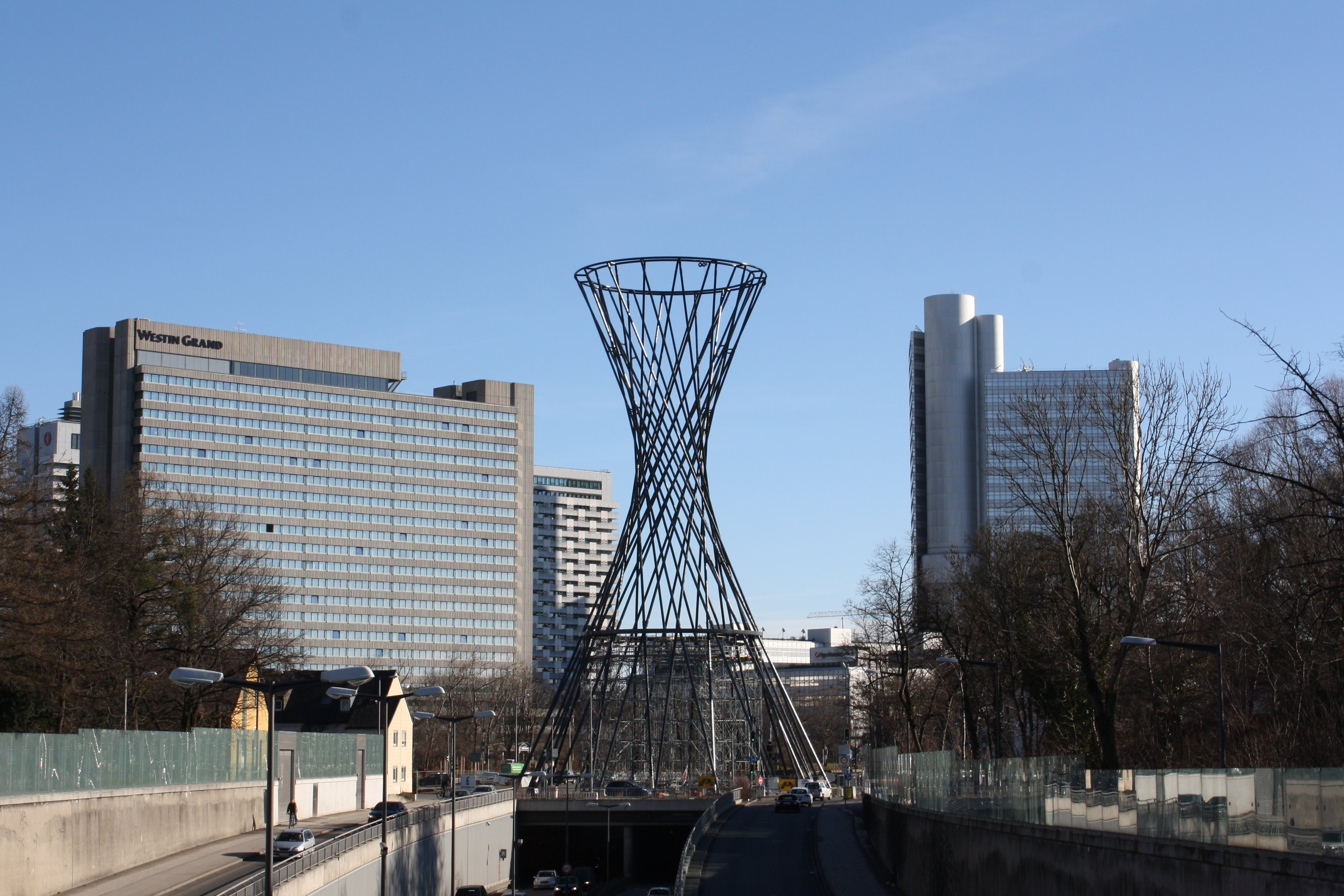 Skulptur Mae West von Rita McBride